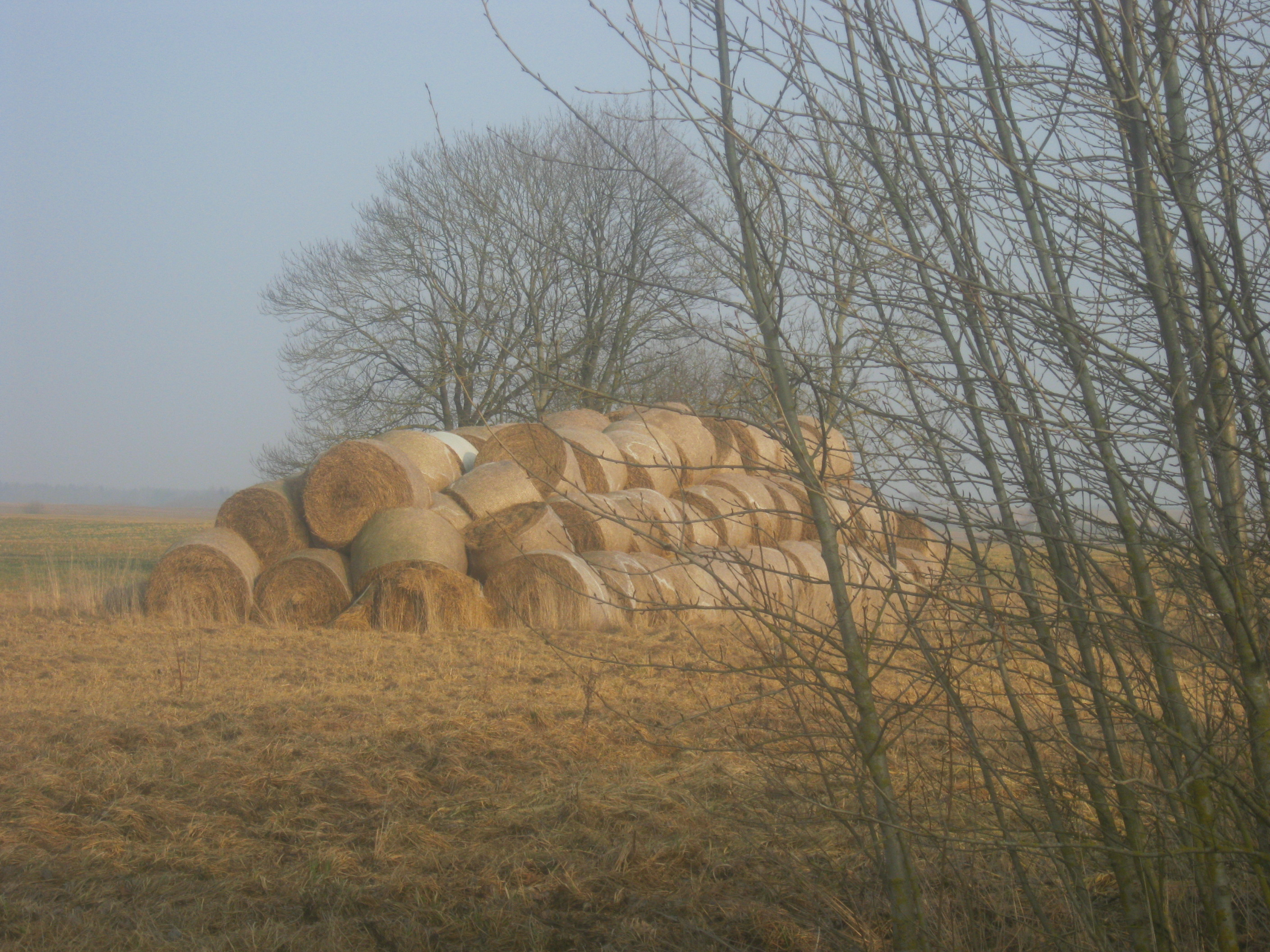 Jonavos rajonas